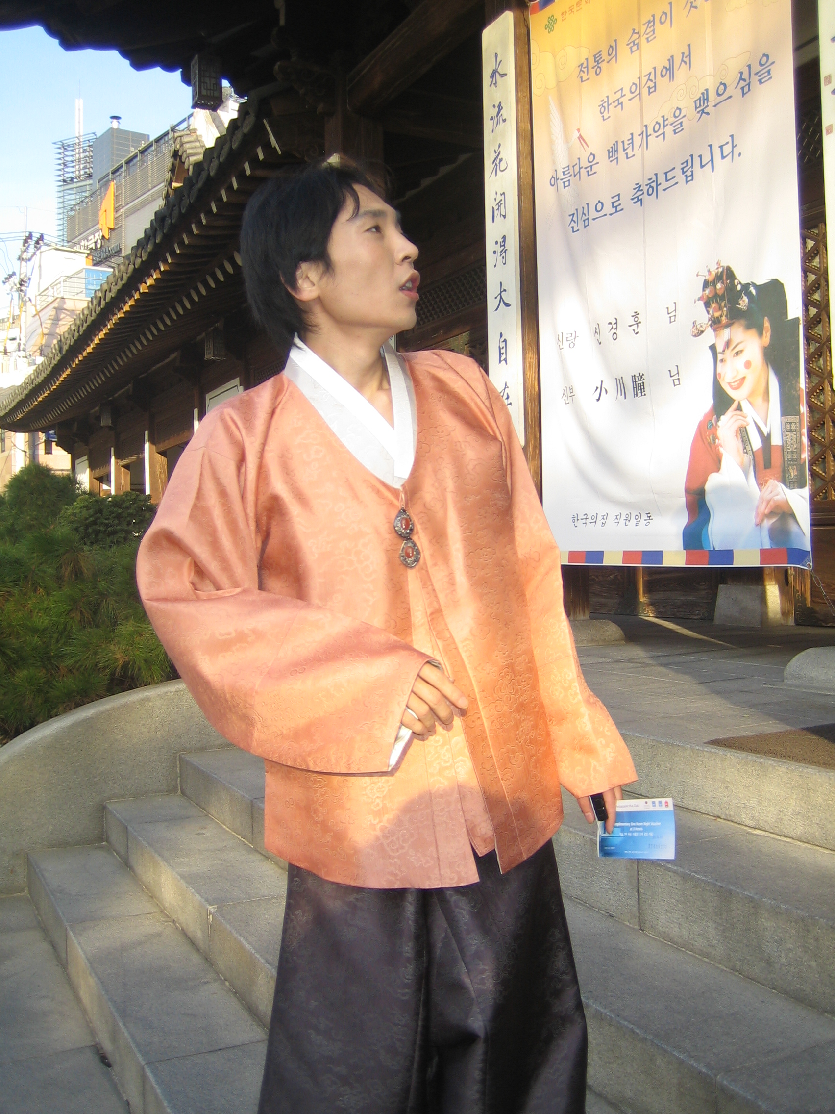 Korean costume-Hanbok-Magoja and baji